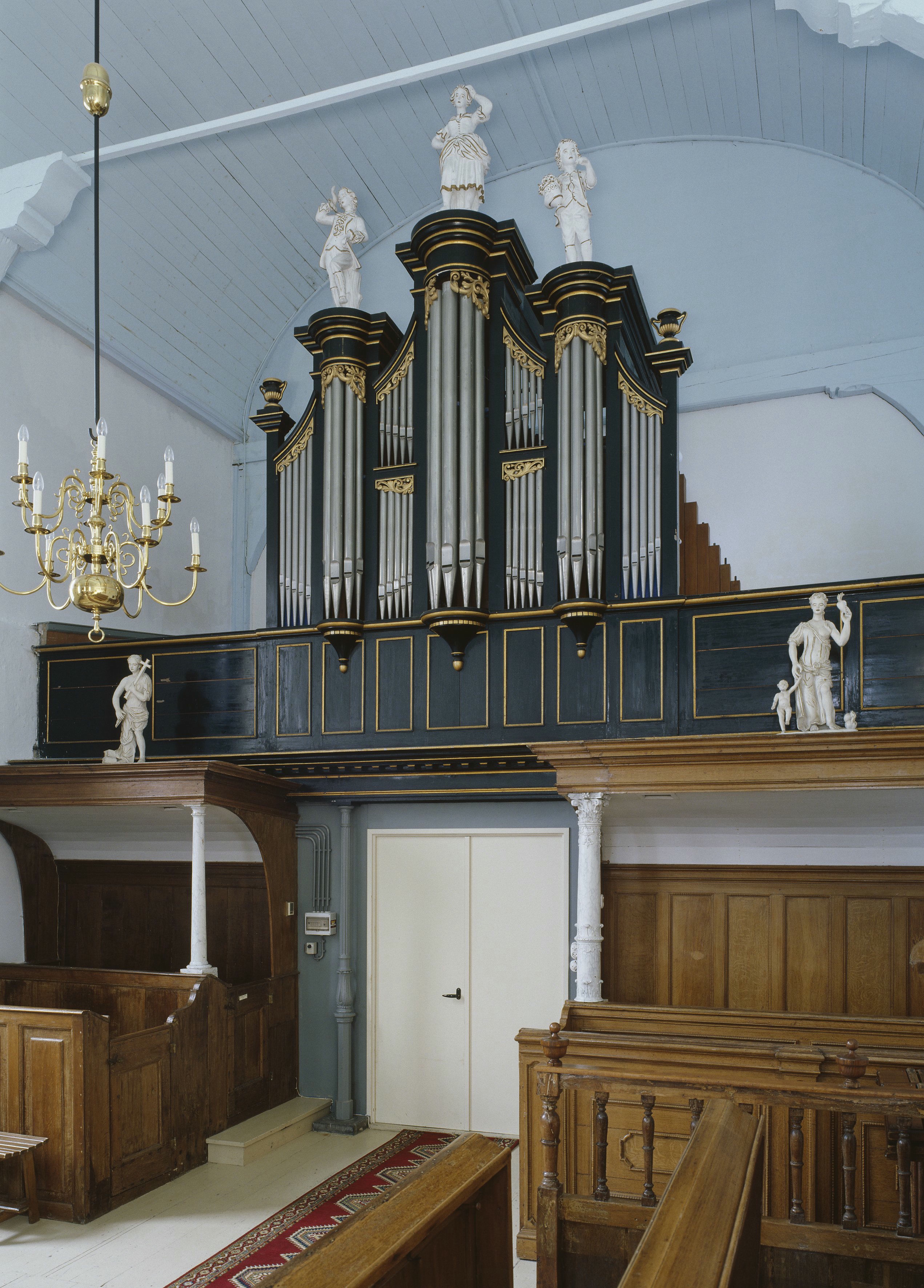 Nederlands Hervormde Kerk: Interieur, aanzicht orgel, orgelnummer 1232 (opmerking: Gefotografeerd voor Het Historische Orgel in Nederland 1878-1886, Bladzijde 39)